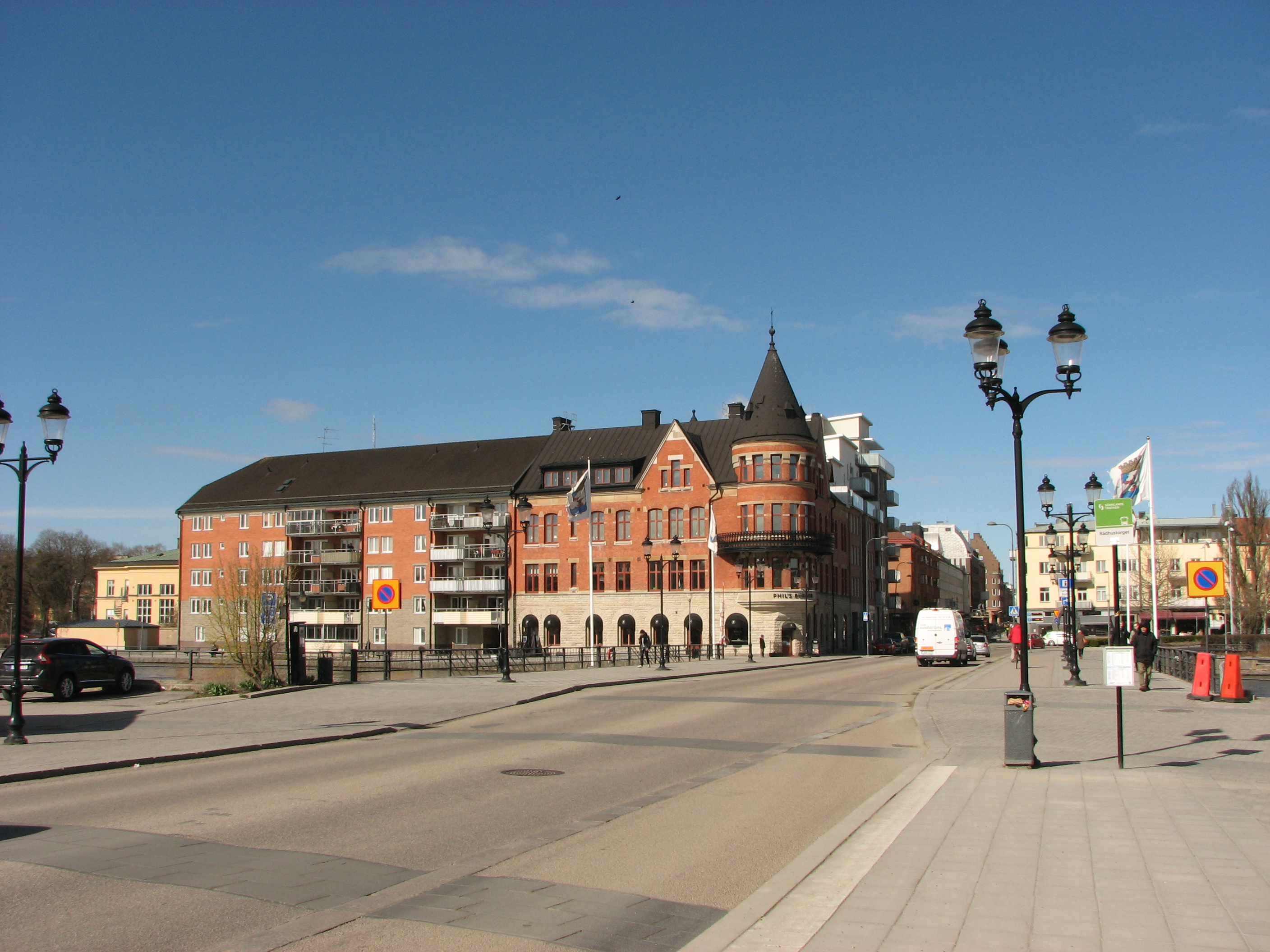 Rådhusbron bridge in Eskilstuna.